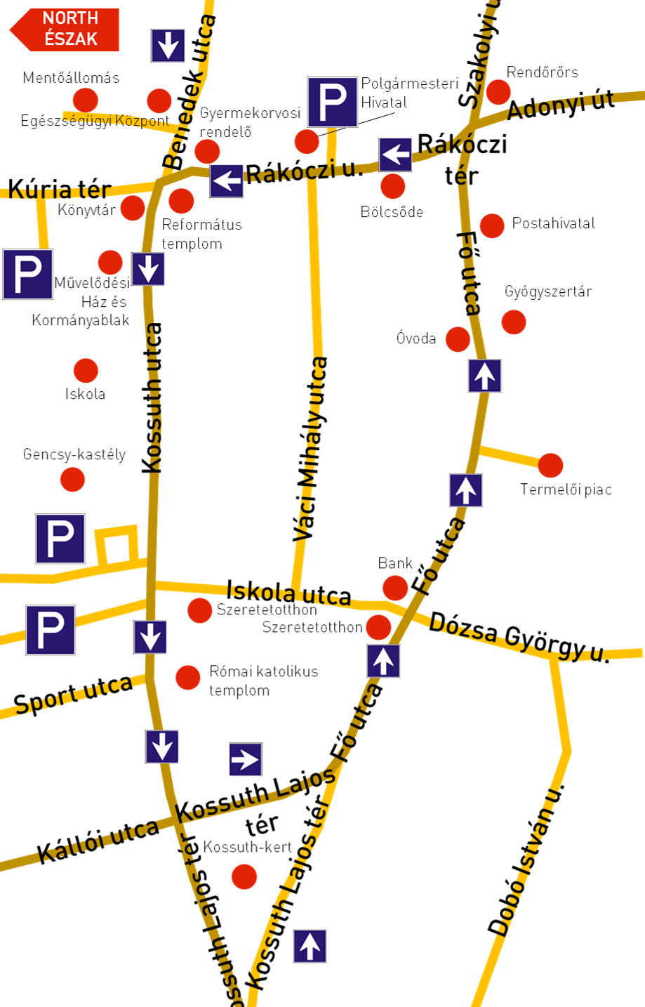 Balkány belvárosának a vázlatos térképe